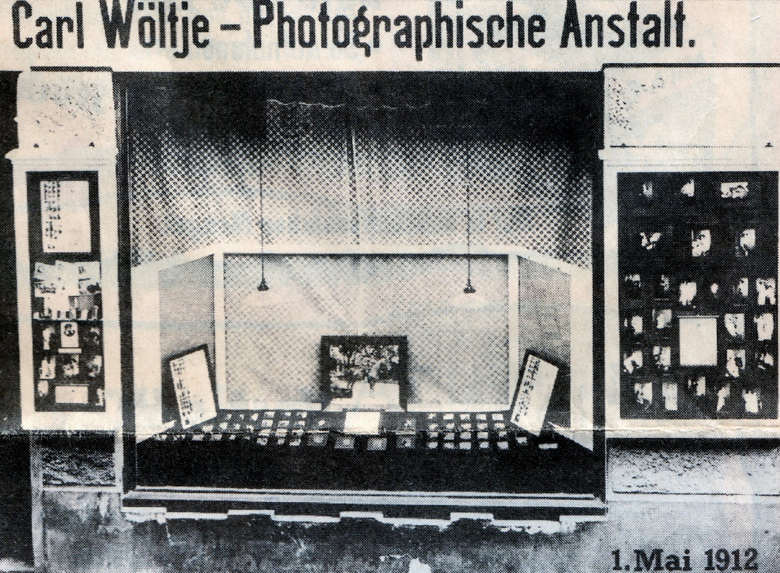 Das Schaufenster am ersten Tag